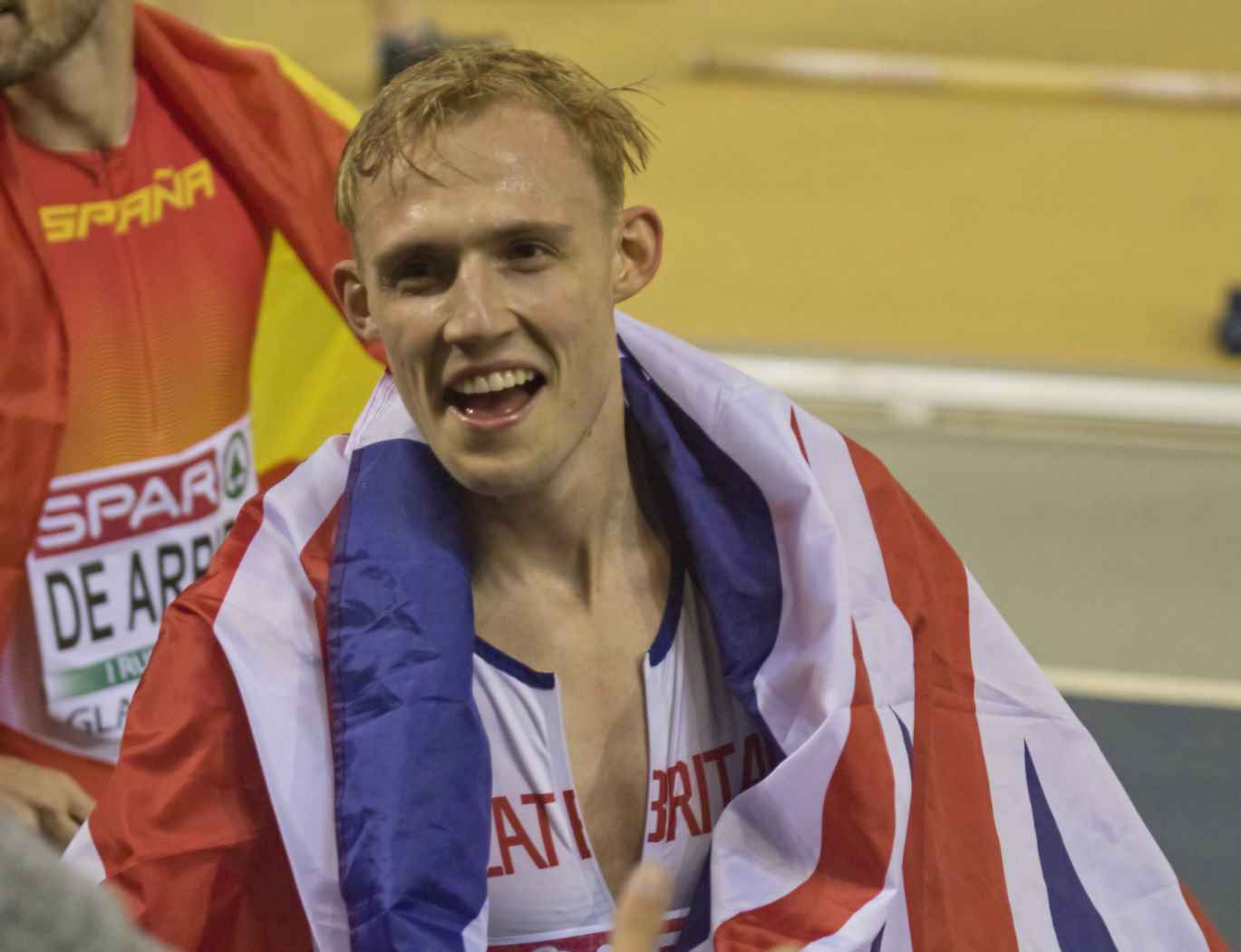 EKI30373 finale 800m man jamie webb